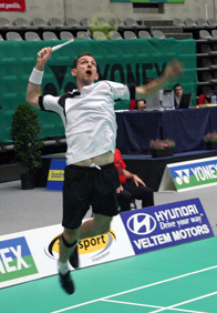 Michał Łogosz podczas turnieju Yonex Belgian International 2011.